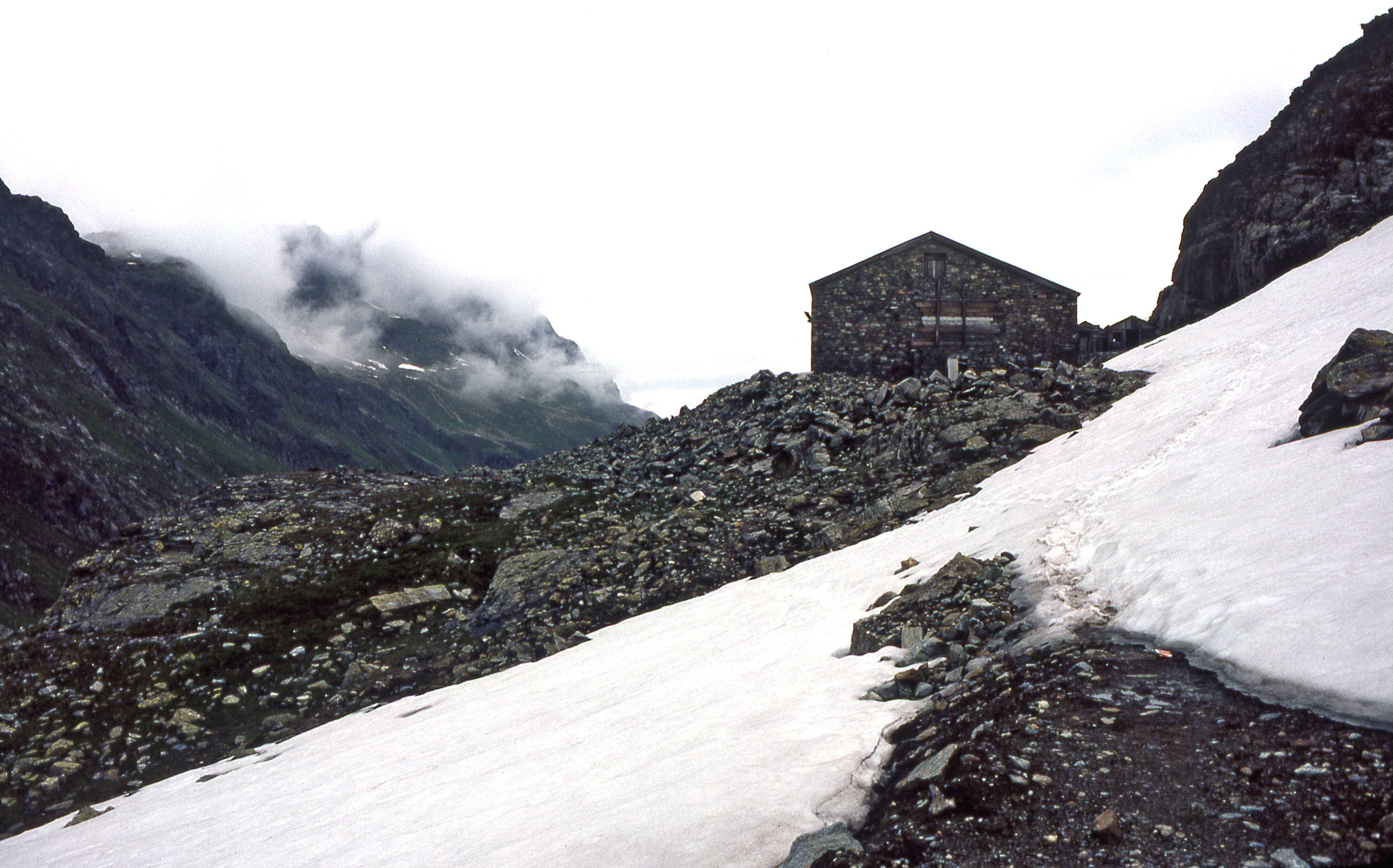 Klostertaler Umwelthütte (2362 m) (Südwest-Giebelmauer) samt verfallenden Holzanbauten. Bildmitte unter dem Nebel: Silvretta-Stausee.